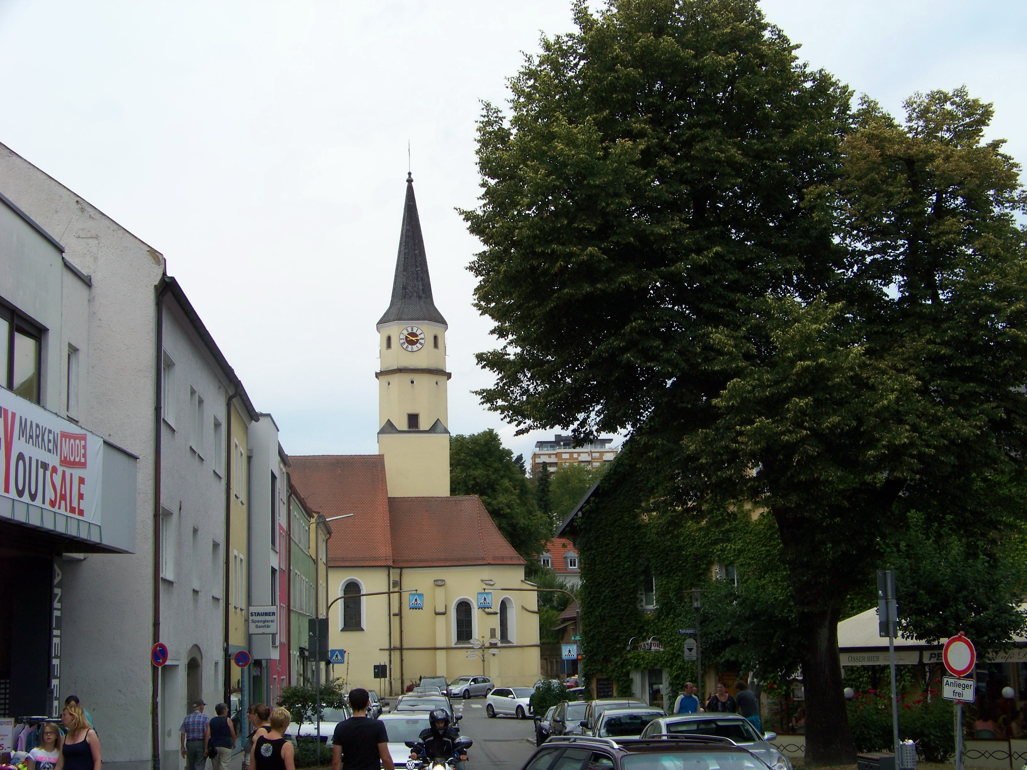 Cham in der Oberpfalz, Spitalplatz 1. Katholische Spitalkirche Hl. Geist, traufständiger Saalbau mit eingezogenem Chor, Satteldach, Vorzeichen mit Walmdach und Chorflankenturm mit Spitzdach, bezeichnet 1514, Ausbau nach 1742, Portalvorbau 1913; mit Ausstattung.